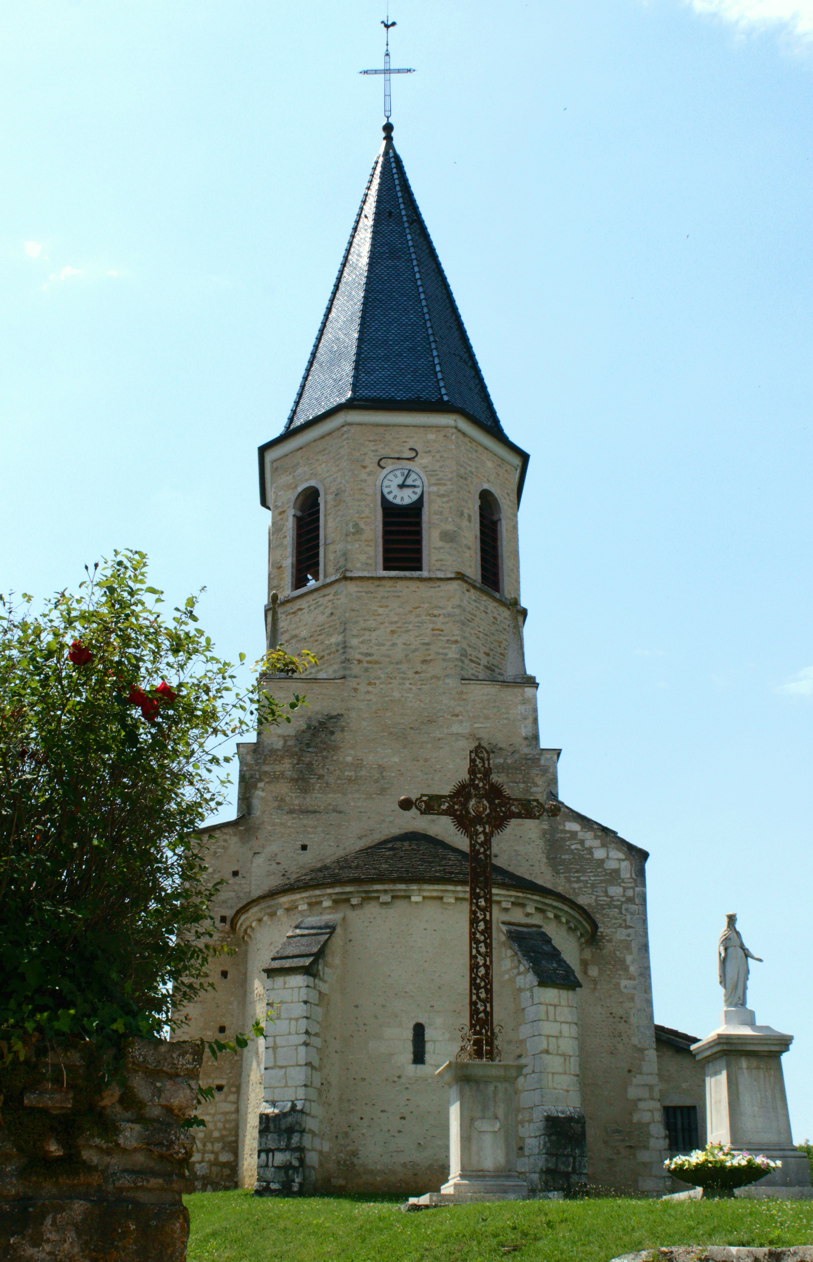 Eglise Saint-Barthélémy, Buellas, département de l'Ain, France